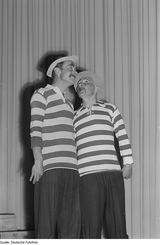 Original image description from the Deutsche FotothekZwei Komödianten